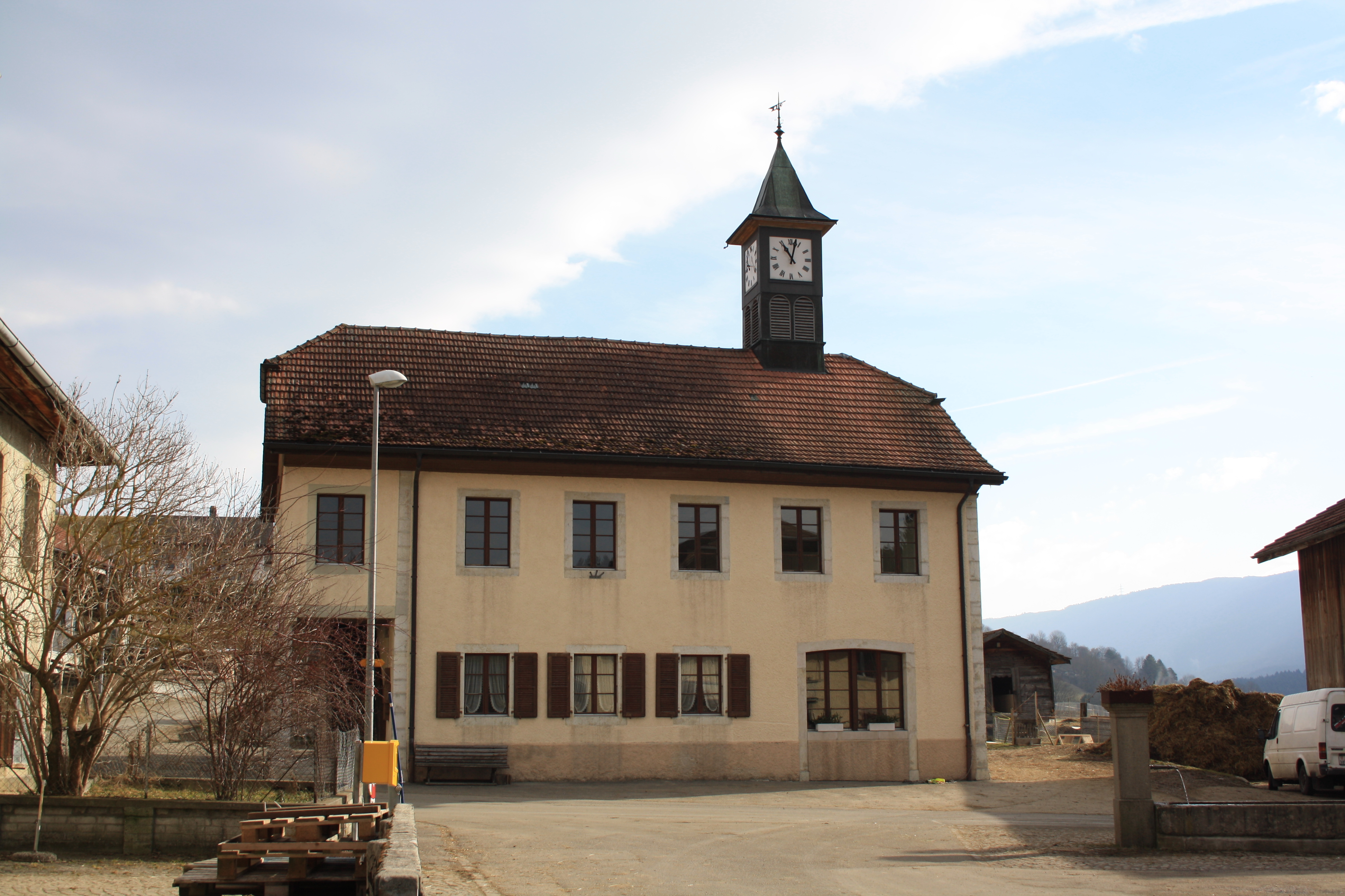 Saules BE